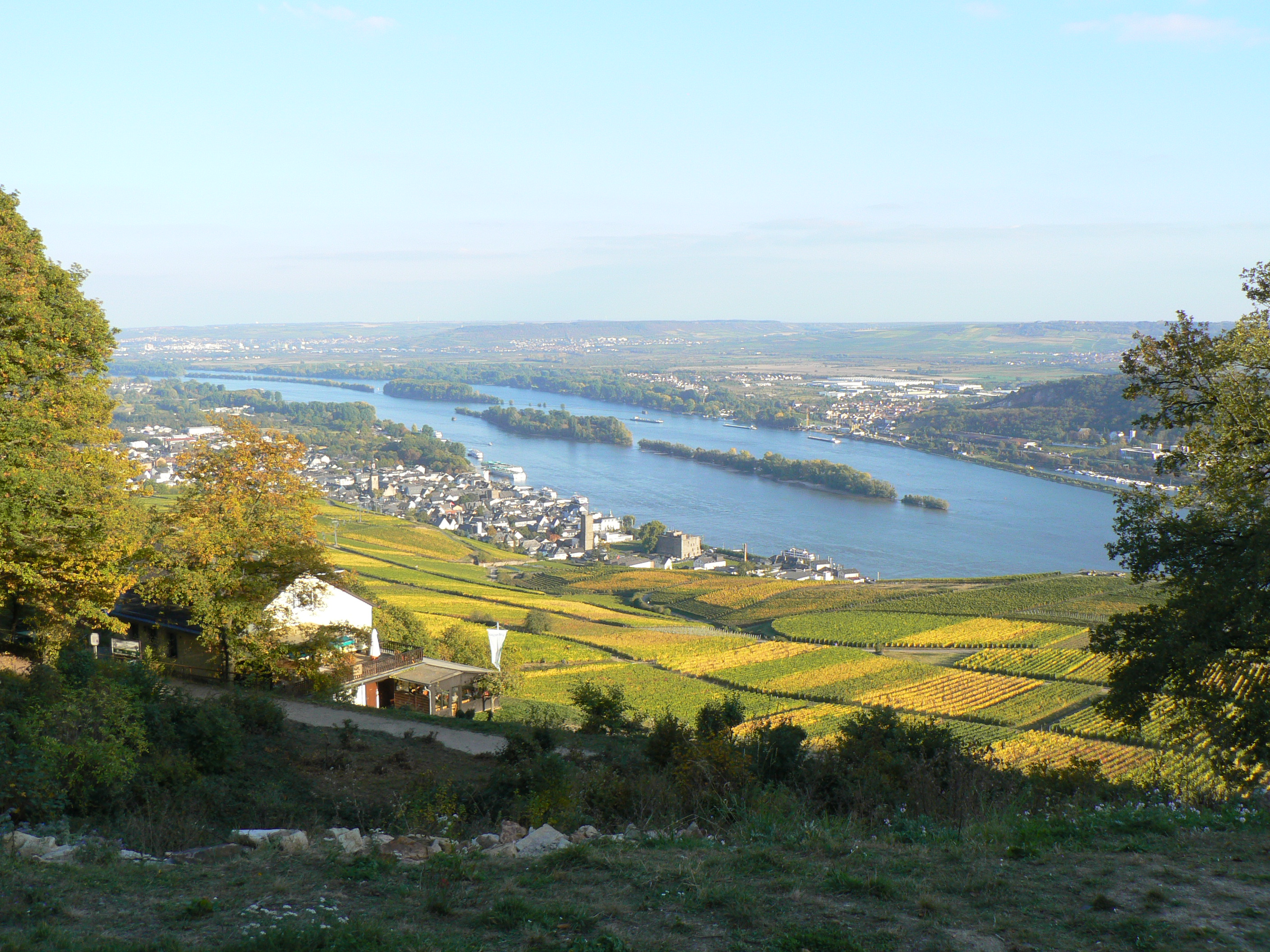 Rüdesheim am Rhein